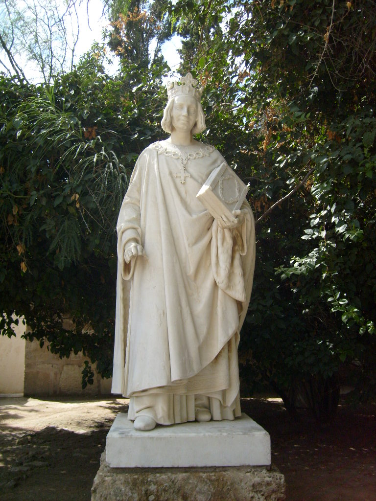 Statue de Louis IX de France (saint Louis) dans les jardins du Musée national de Carthage (Tunisie)